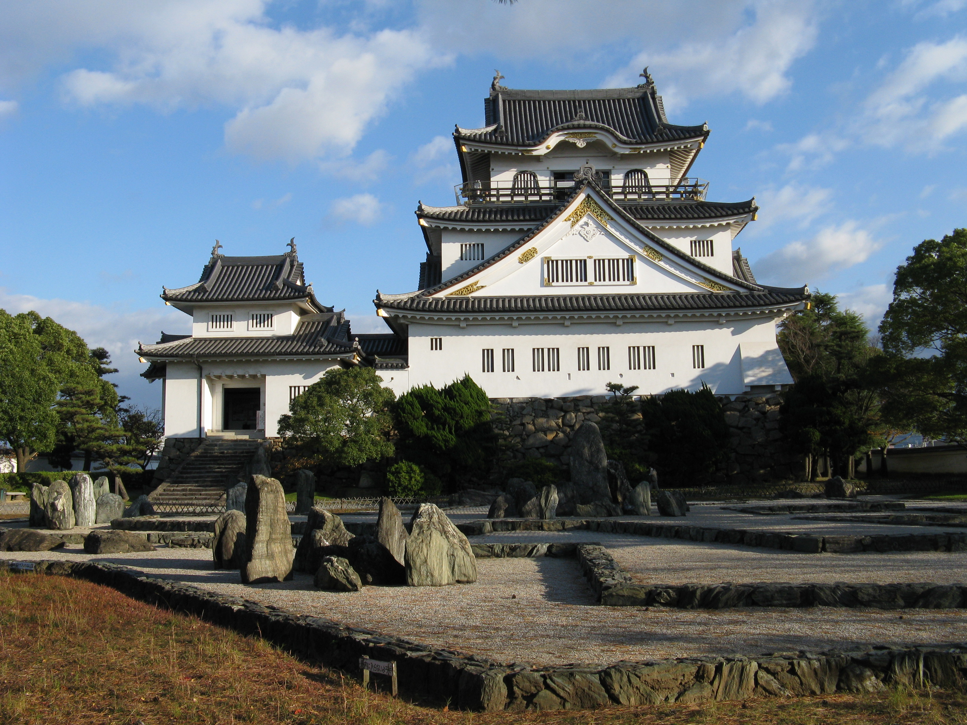 岸和田城 天守